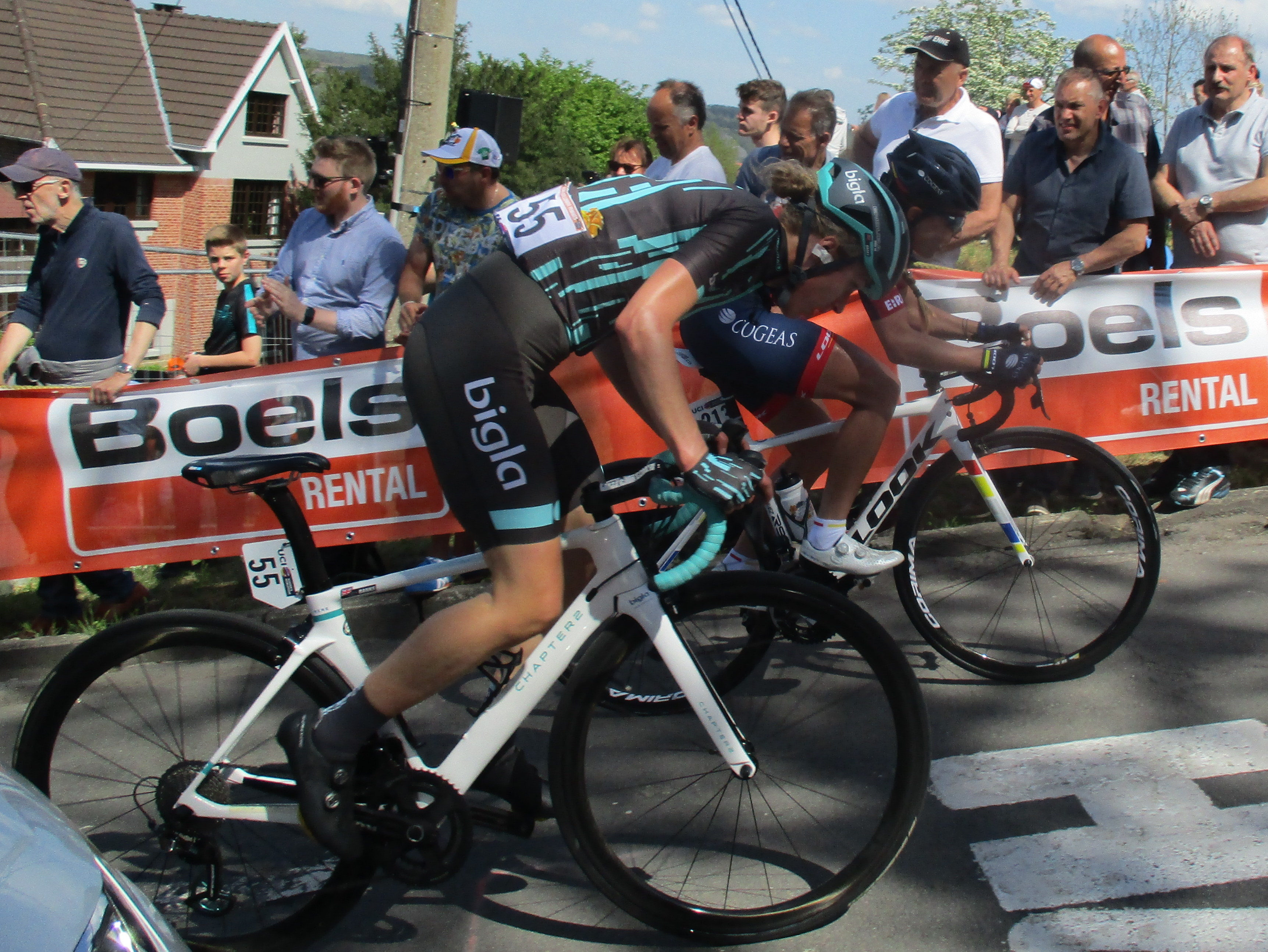 Eerste passage van de Waalse Pijl 2019 voor vrouwen op de Mur de Huy